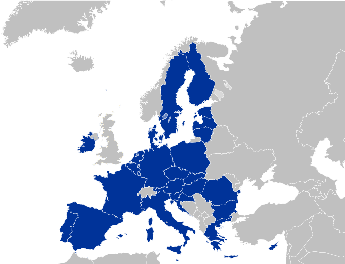 A união européia atualmente